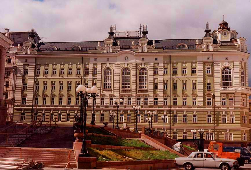 Административно-вспомогательный корпус Большого театра (Москва, Копьевский переулок 3 - позади здания театра). Реконструированное здание бывшей гостиницы 1890-х годов. Исторический облик см. например здесь, непосредственно левее театра